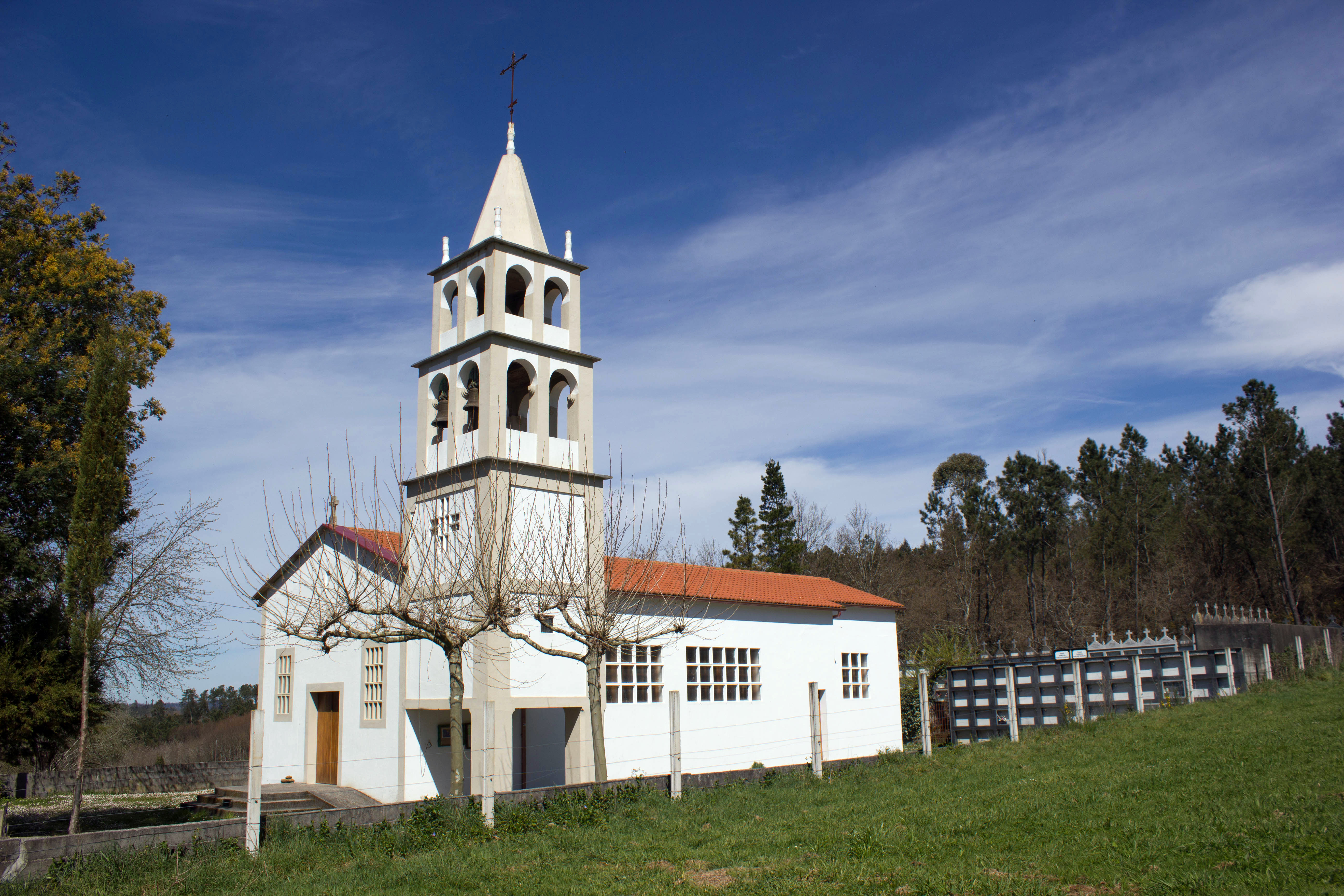 Igrexa nova de San Pedro de Viñós, no concello de Arzúa.